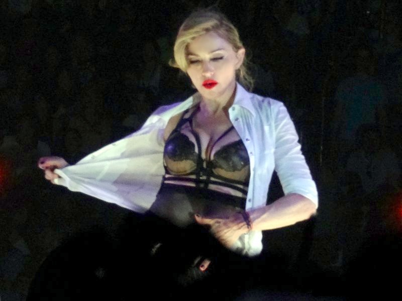 Madonna performing Human Nature during her concert in Berlin, Germany.